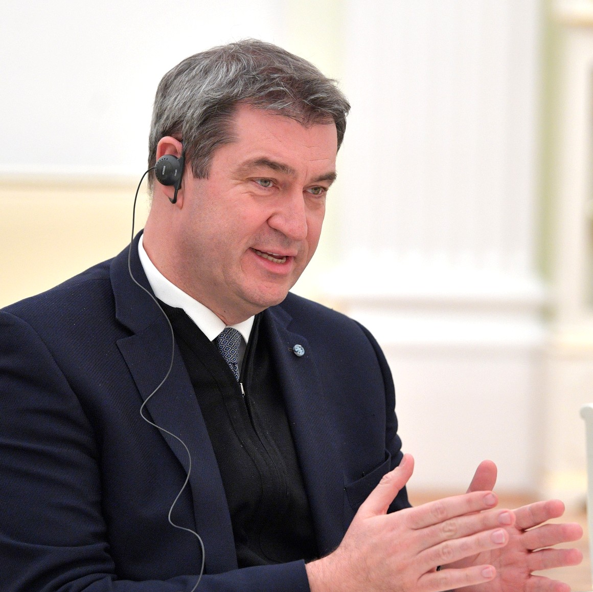 Премьер-министр федеральной земли Бавария Маркус Зёдер во время встречи с Президентом России Владимиром Путиным